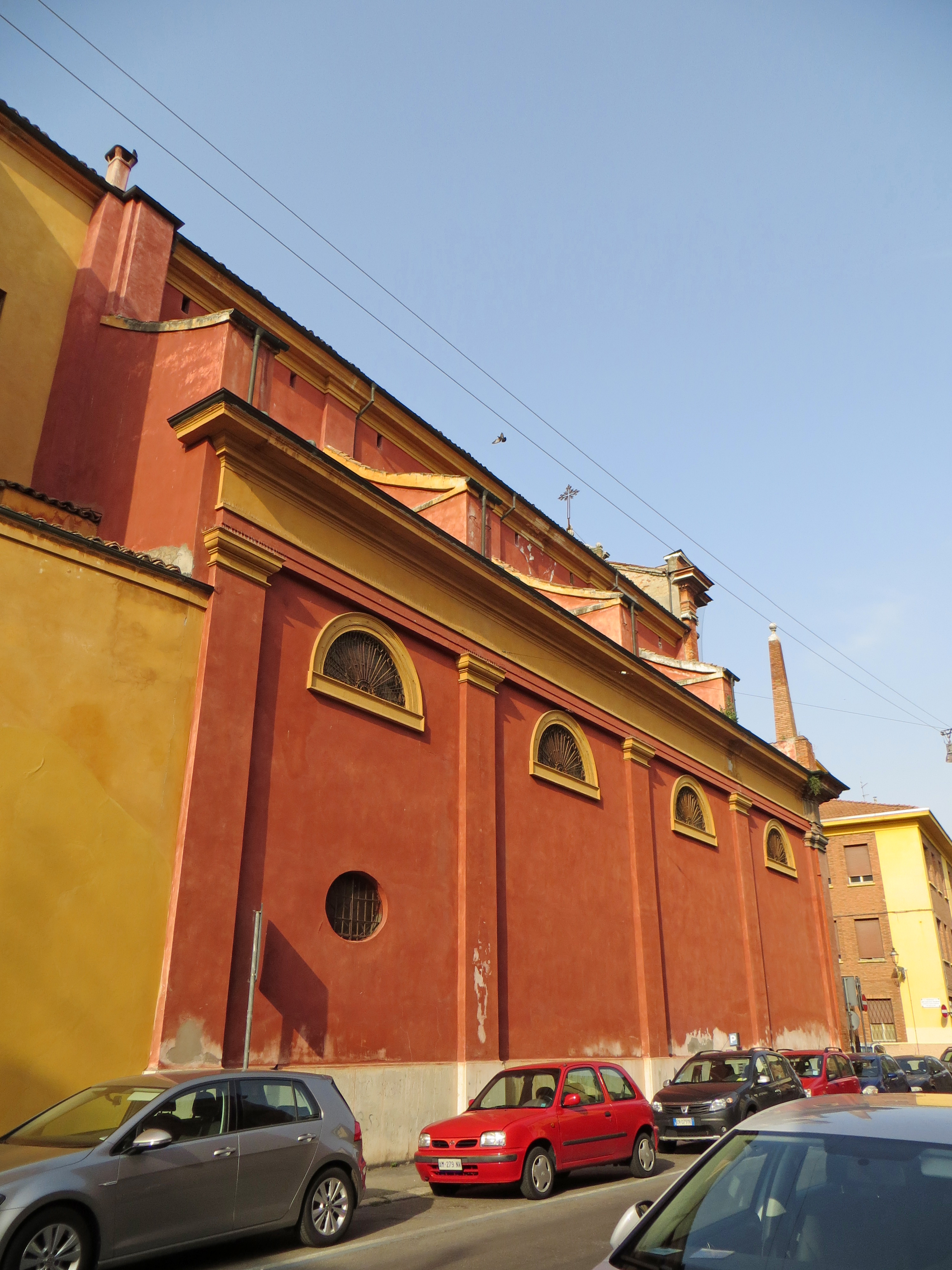 Chiesa di San Giuseppe (Parma) - lato sud